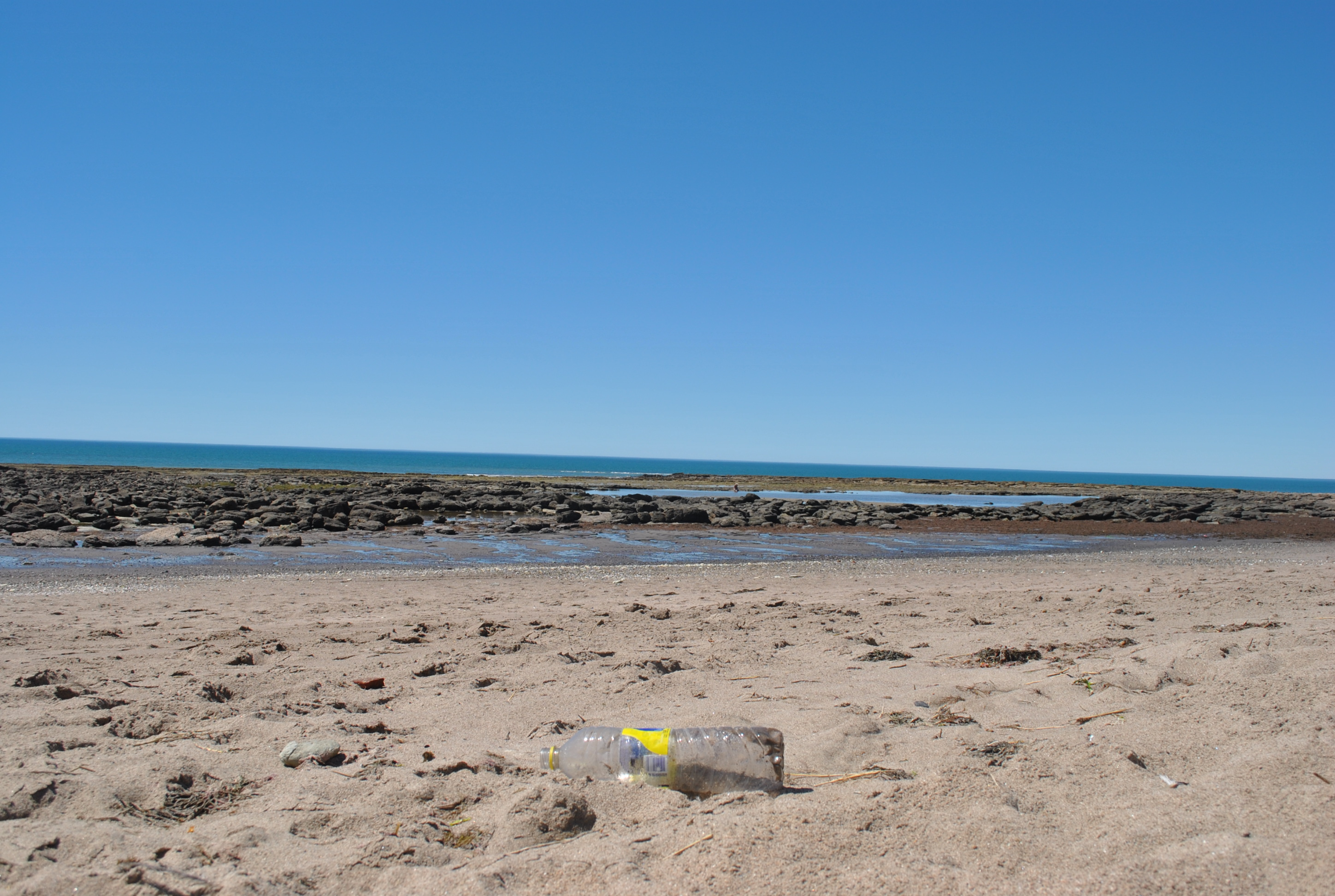 Residuos inorgánicos arrojados en las playas que contaminan.